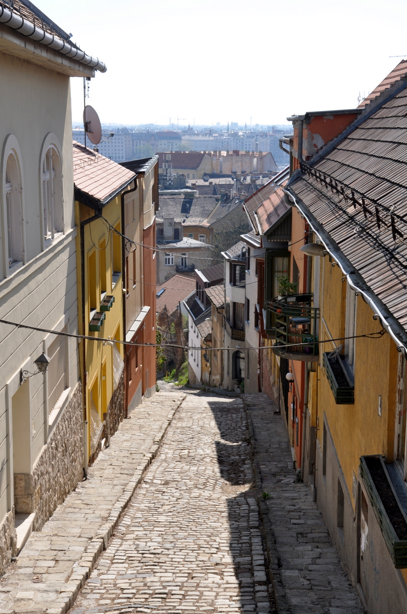 Gül Baba Street, Budapest, Hungary